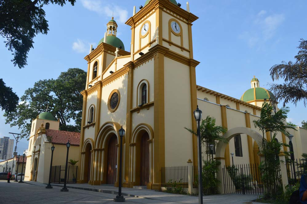 fotografia